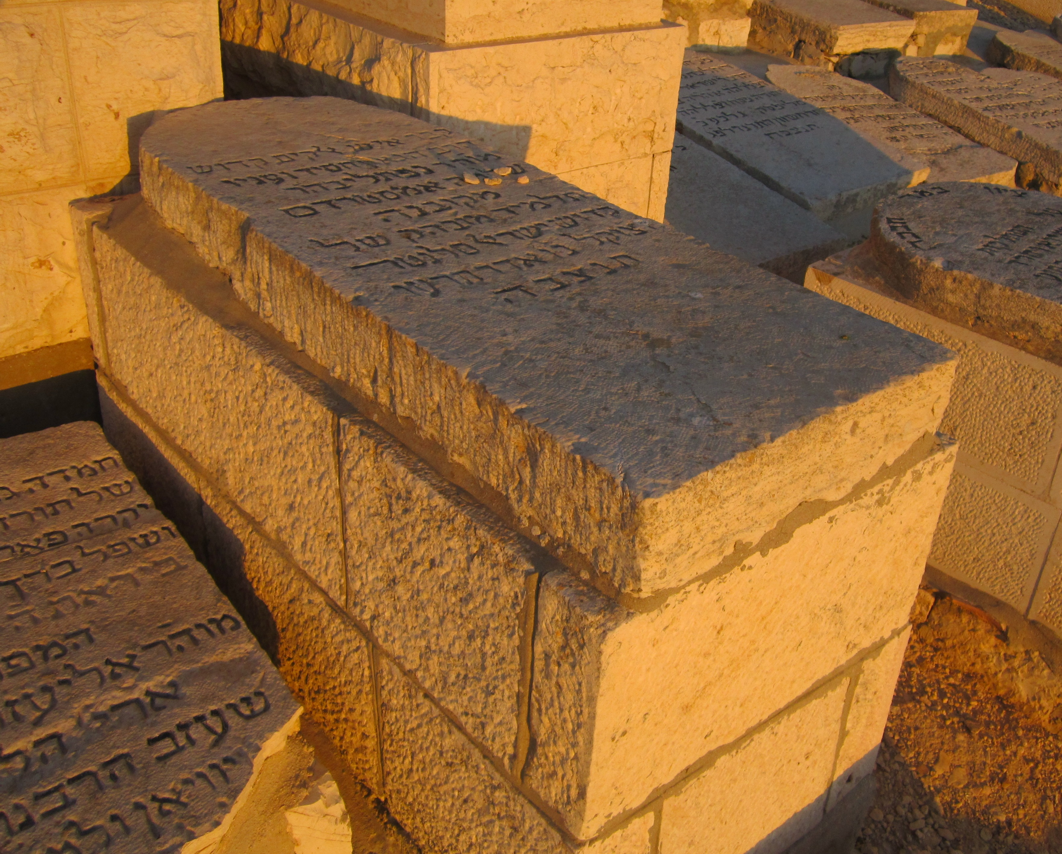 קבר רבי נפתלי אמסטרדם בהר הזיתים